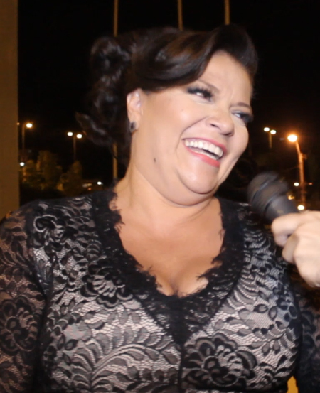 Fragmento del video en bruto para mi programa de YouTube de Tábata Gálvez en los Premios ITV. En el video dejo la licencia libre para la imagen de Tábata Gálvez